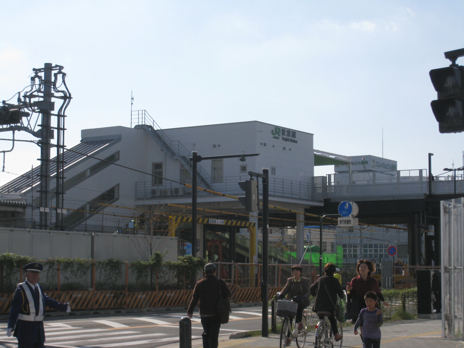 辻堂駅西口